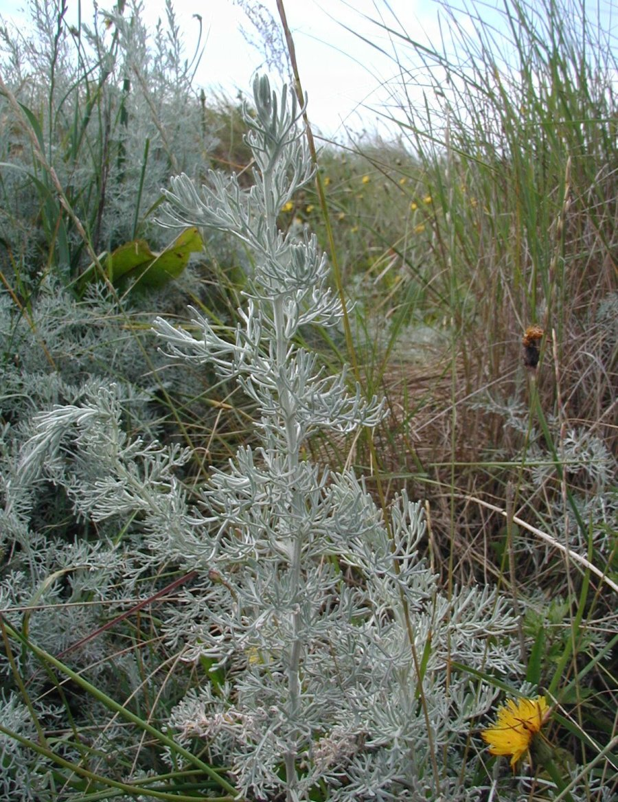 Artemisia maritima: Habit.